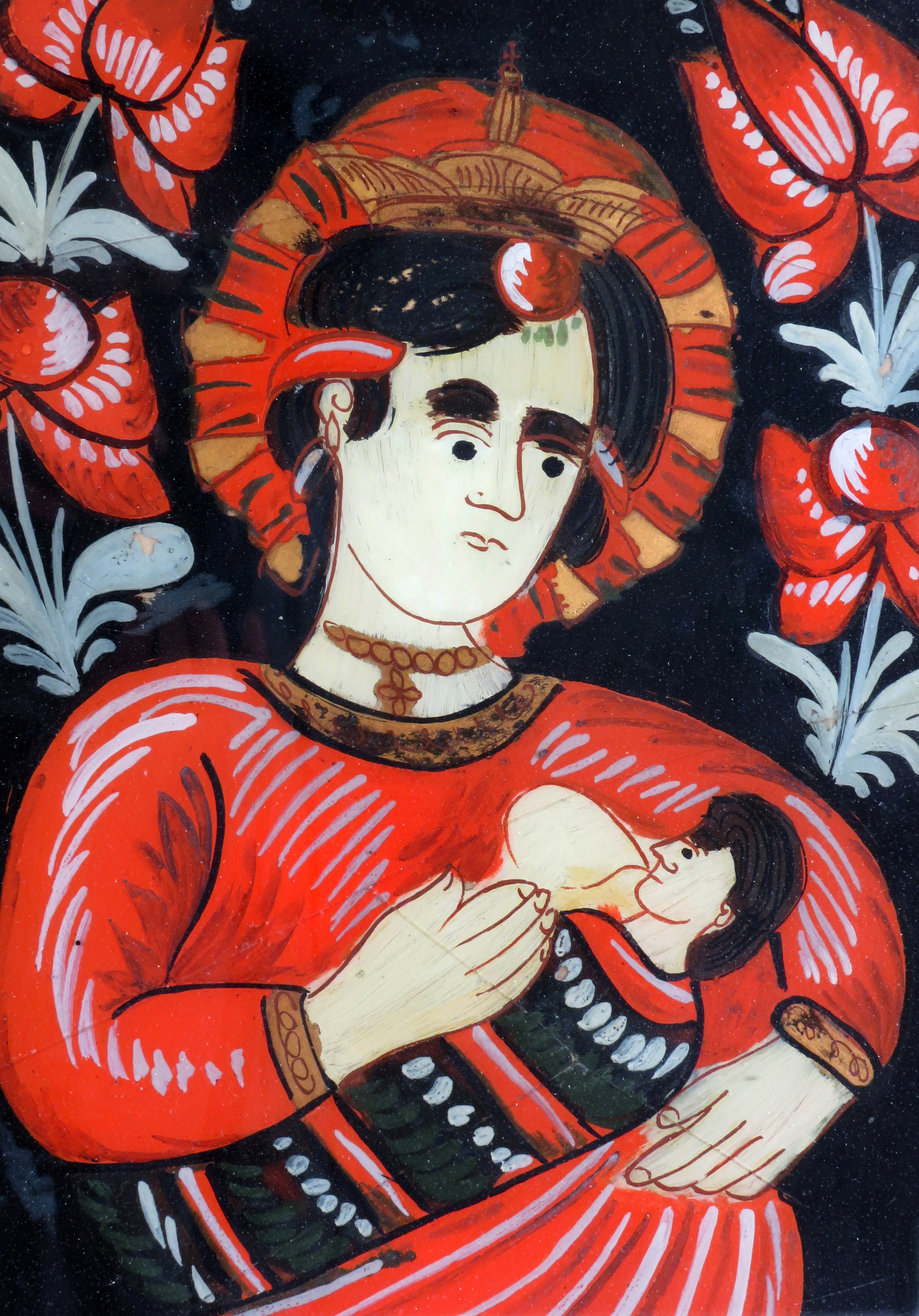 Malarstwo na szkle ze zbiorów Państwowego Muzeum Etnograficznego w Warszawie